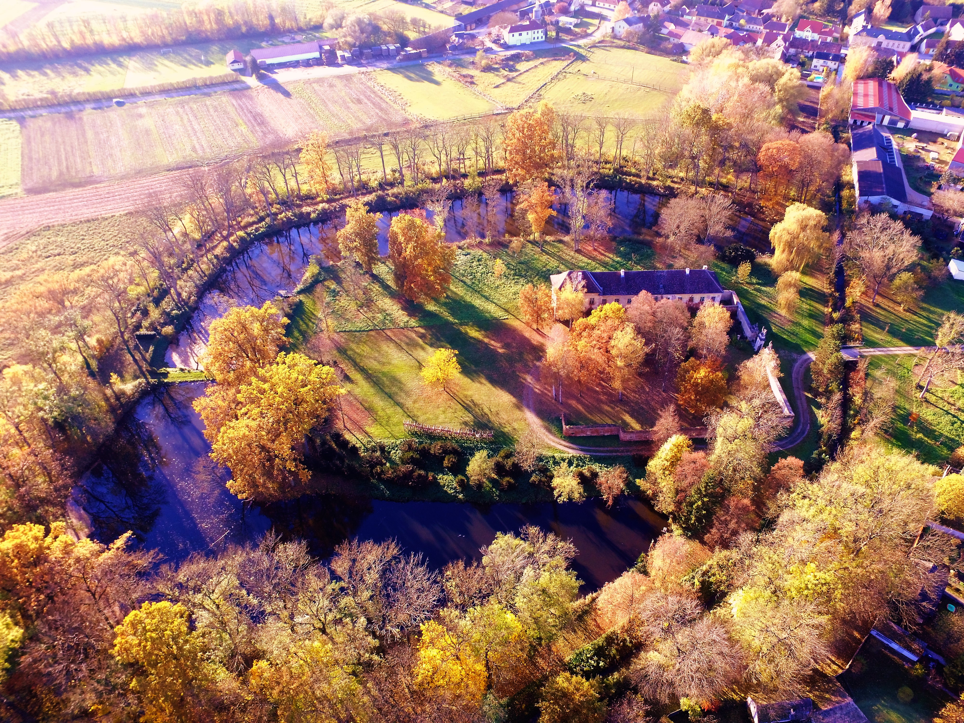 Rest des Schlosses